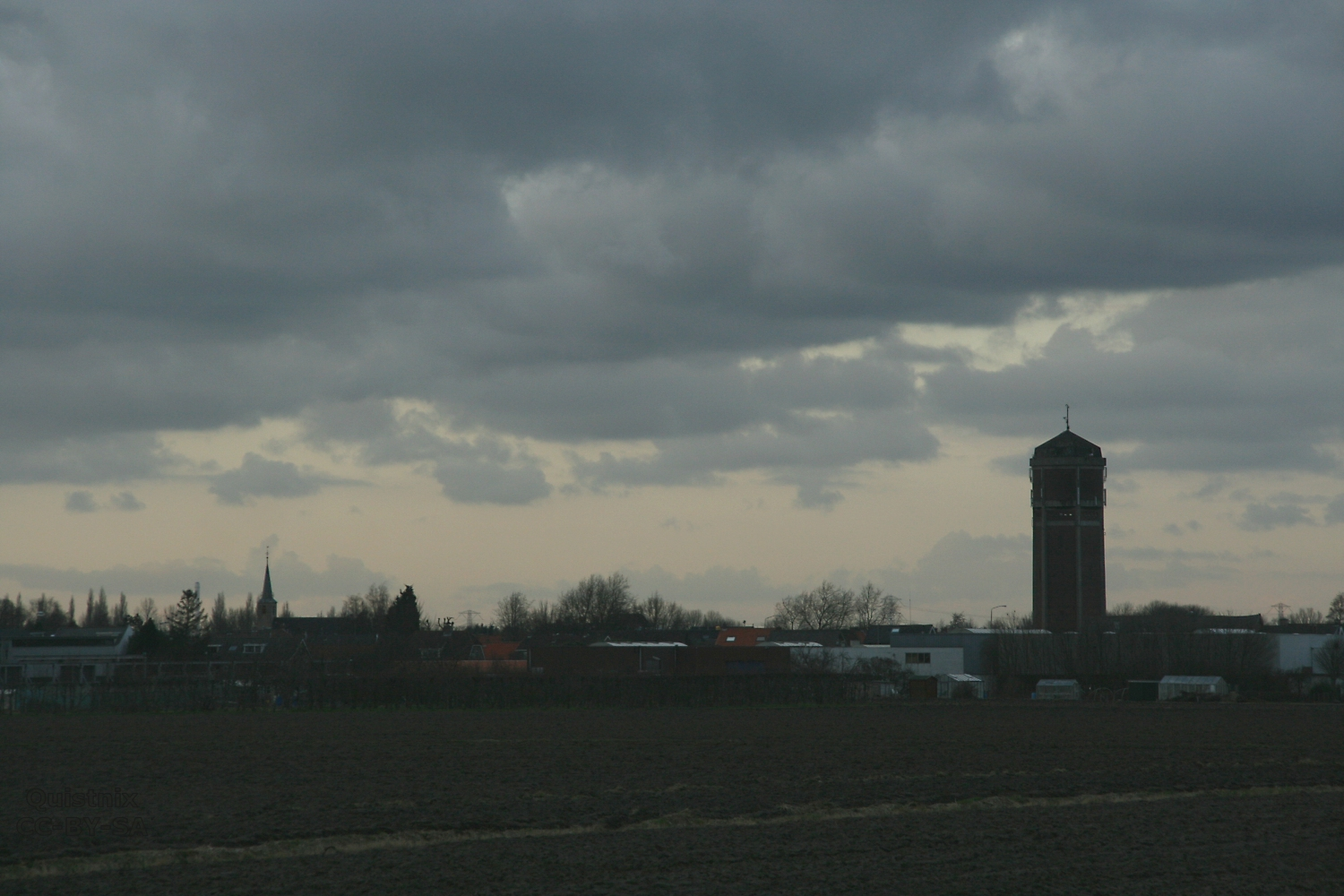 Klaaswaal: watertoren en de omgeving ervan